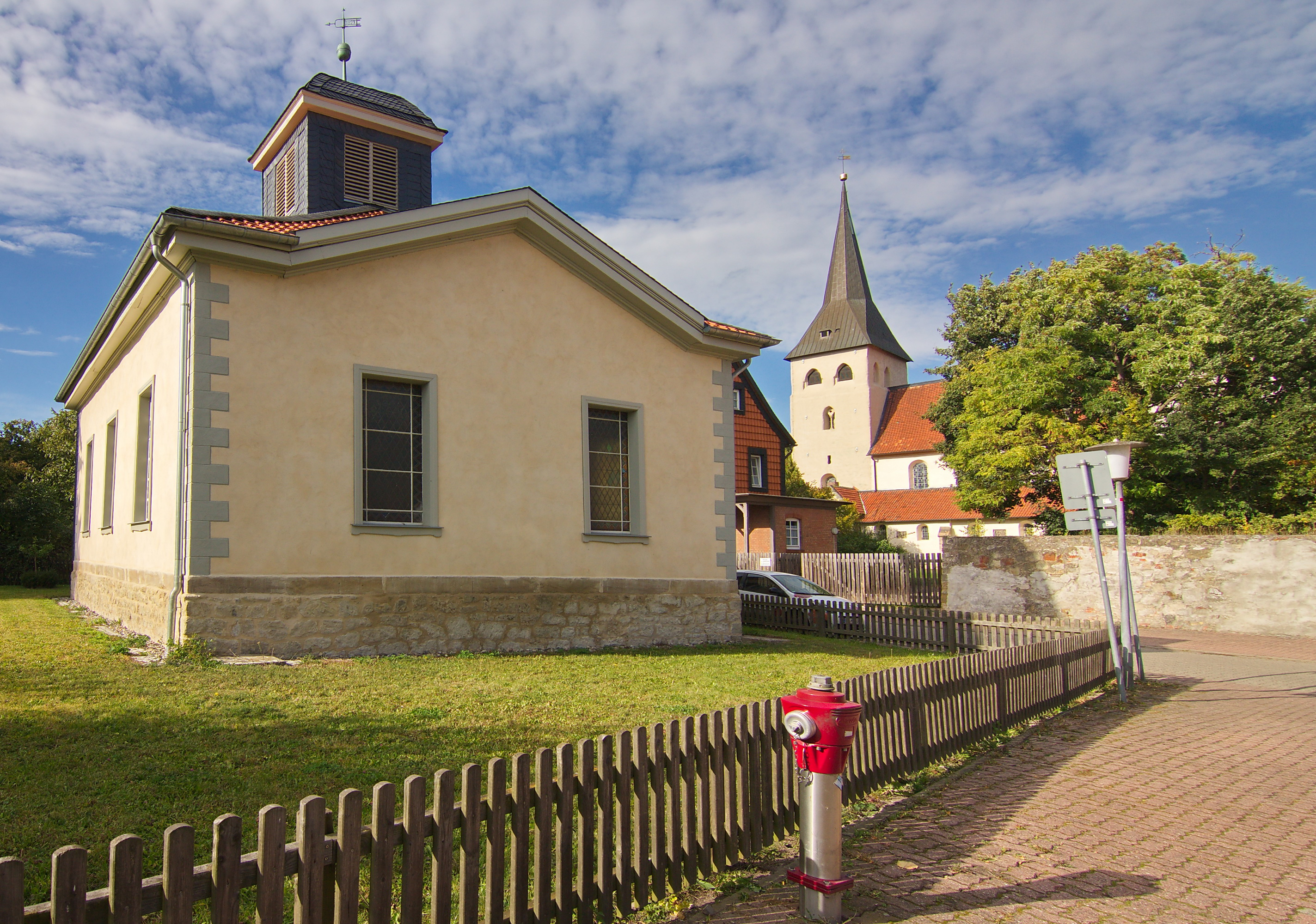 Die evangelisch-lutherische Lukaskirche in Heiningen gehört zum Pfarrverband Heiningen-Werlaburgdorf mit Sitz in Werlaburgdorf.